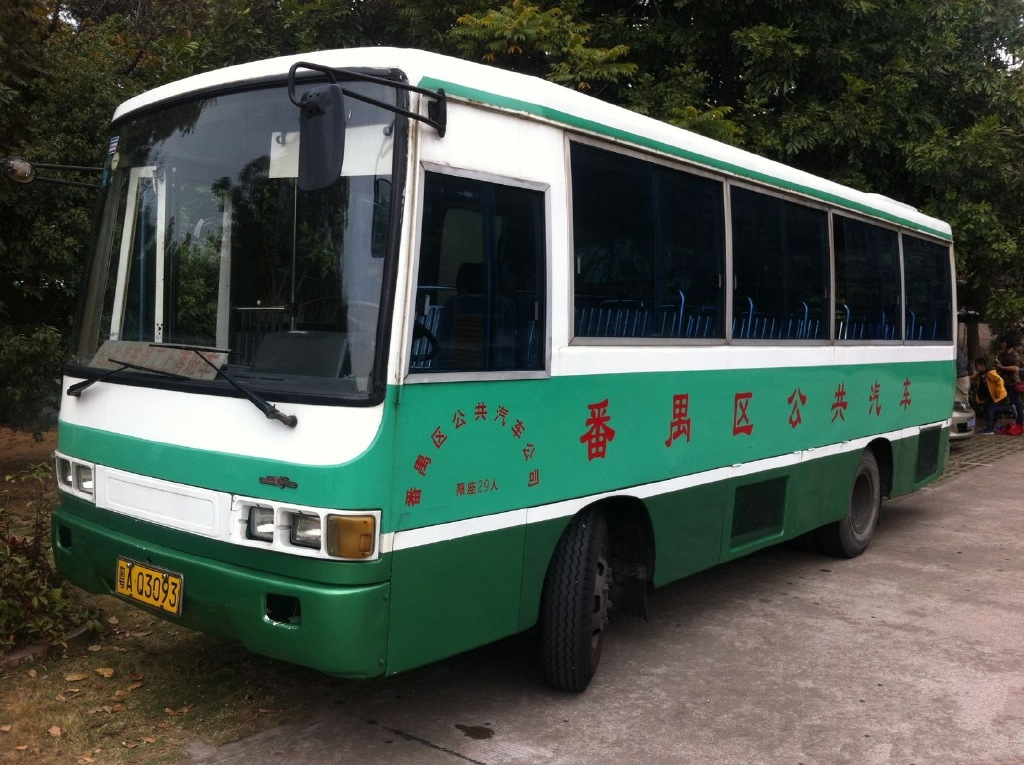 第一代番禺区公共汽车车辆